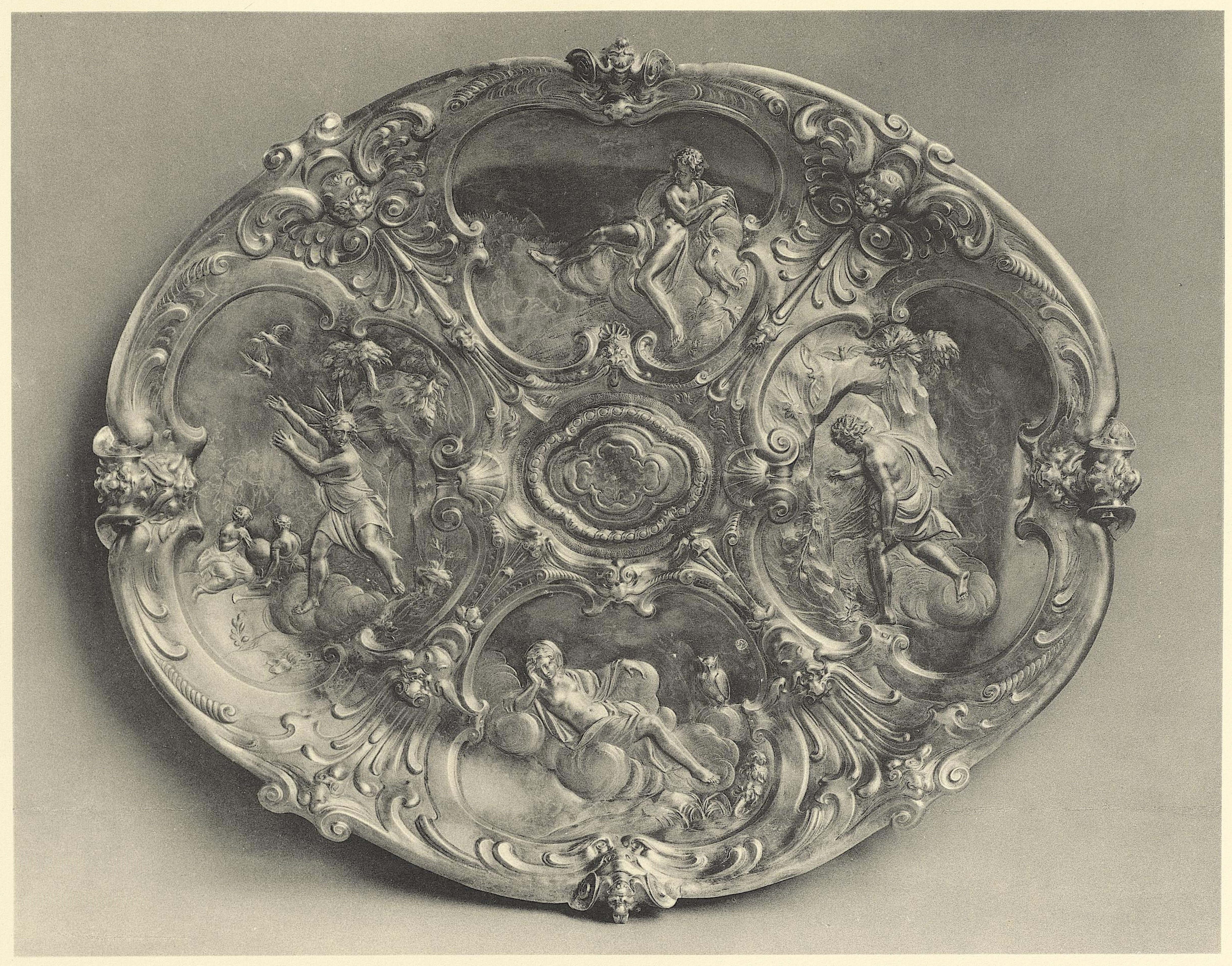 Ovale Prunkschüssel mit den vier Tageszeiten in Knorpelwerk-Umrahmung, getrieben von einem Augsburger Meister der Mitte des 17. Jahrhunderts (Beschreibung gemäß Quelle) aus: Das Grüne Gewölbe zu Dresden: eine Auswahl von Meisterwerken der Goldschmiedekunst ; in vier Bänden (Band 2): Gefässe, Figuren und Uhren: aus Gold und Silber verziert in reiner Metalltechnik, oder besetzt mit Juwelen, Kameen und Email ; mit 70 Lichtdrucktafeln, davon 7 farbig. Hiersemann, Leipzig